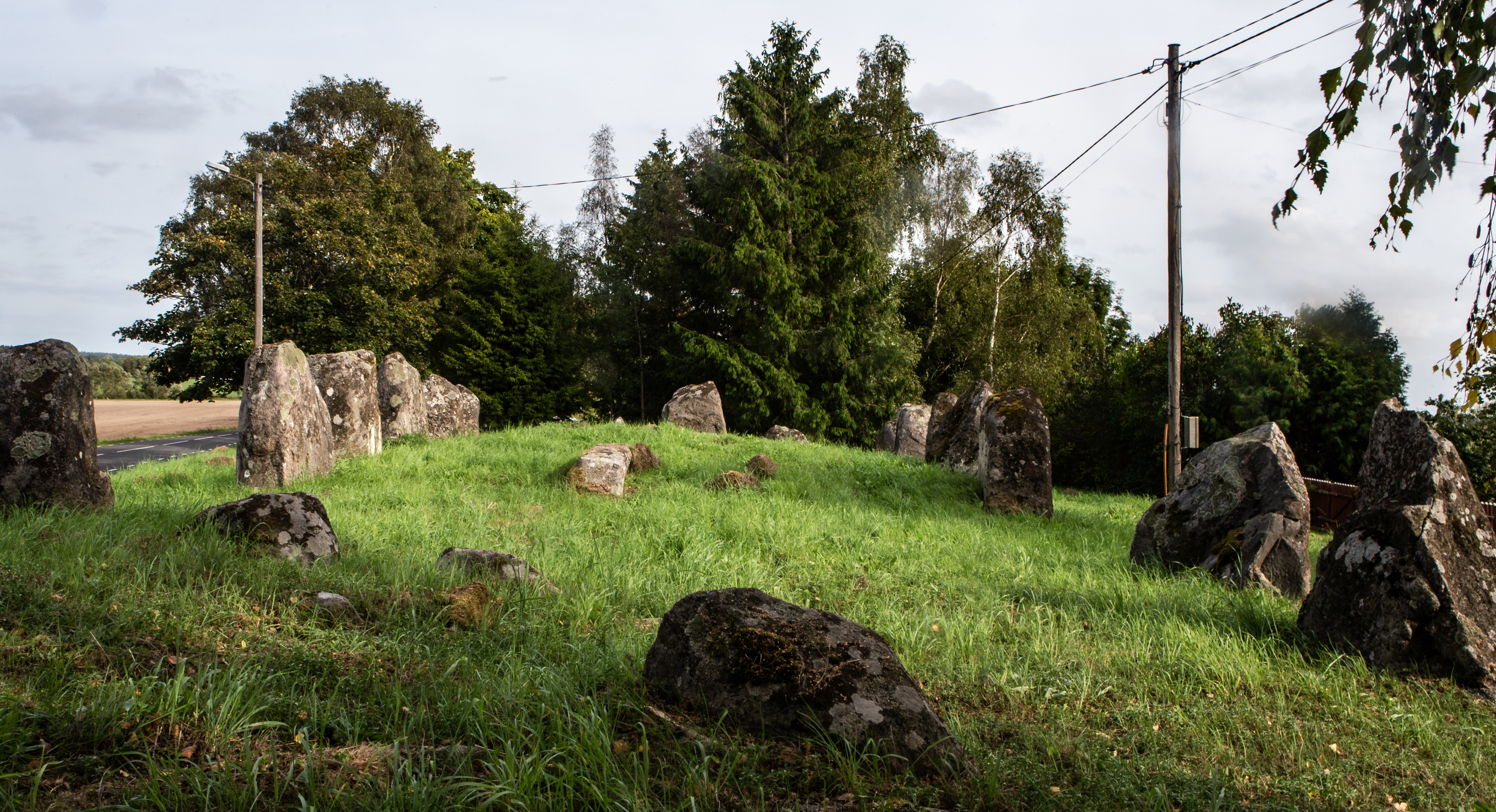 Bröt-Anunds grav (Vinslöv 29:1)